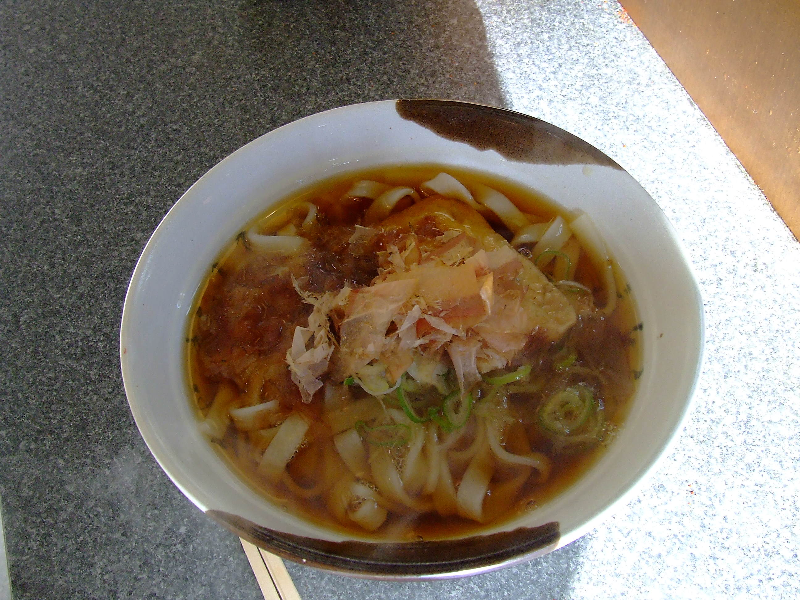 JR東海名古屋駅にて立ち食い形式で販売している「きしめん」